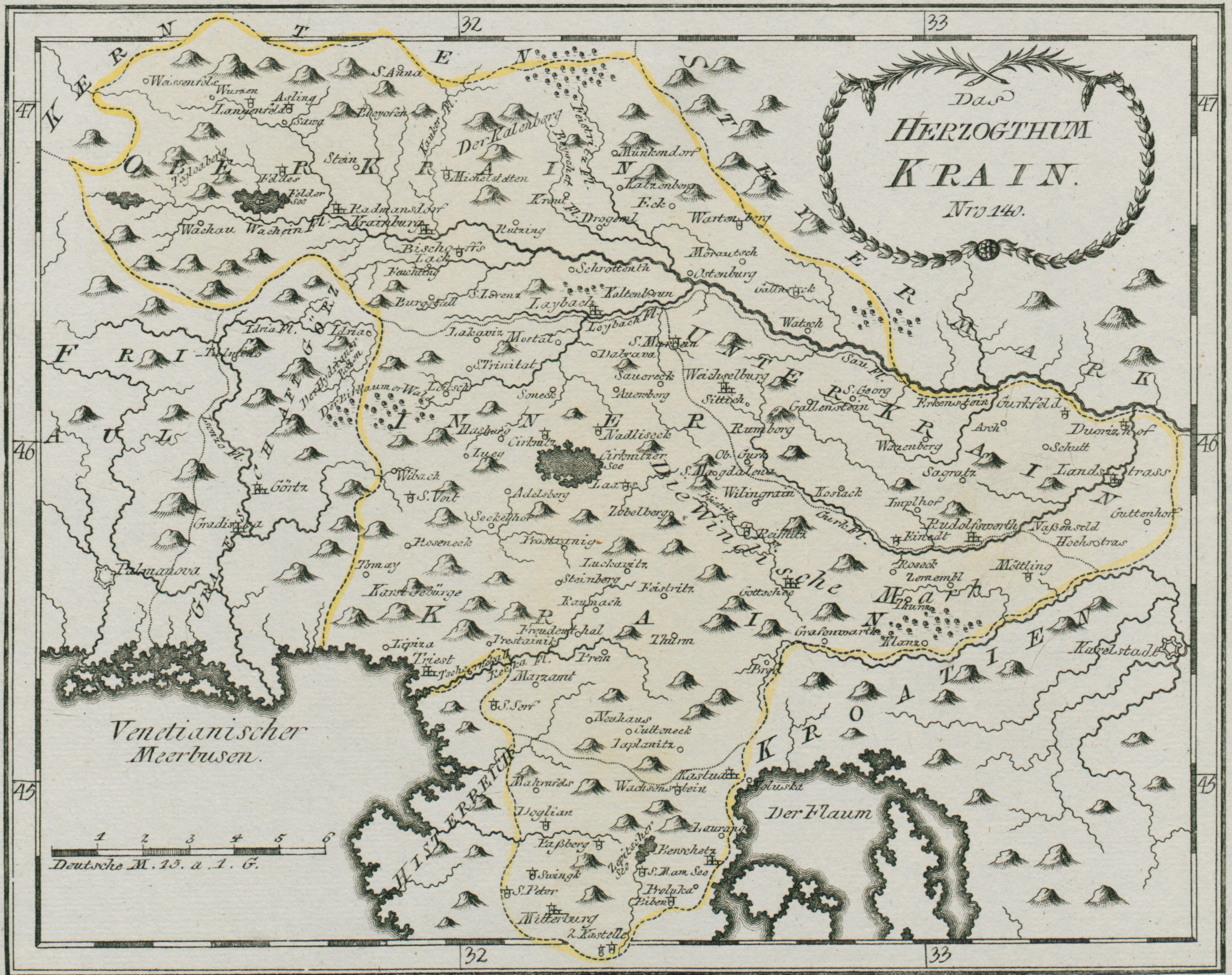 Das Herzogthum Krain.